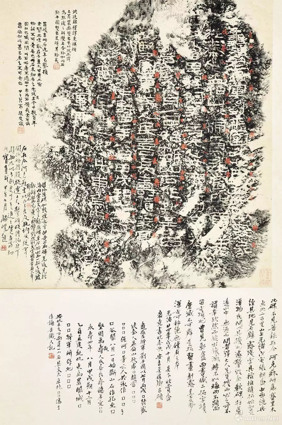 吴昌硕、杨岘、张度跋《汉龟兹左将军刘平国刻石摩崖》，清晚期初拓本，甲午七月，杨岘题。下钤“藐”朱文印，时一八九四年，杨氏七十五岁。吴氏跋云“关外汉碑，如敦煌太守伊吾司马碑。先后见于海内，金石文字之录，兹碑至今始出。而一拓之后，彼乡僻，惊见华人，即凿毁。然则文字有幸有不幸耶。沧石。”下钤“俊卿私印”白文印。又跋云：此碑不见著录，在今阿克苏所属赛里木东北二百里山上。光绪戊寅张朗斋中丞统兵，经其地见石壁露残字。具毡椎精拓，始知是汉物。民间以其扰也，遂凿毁。余叹碑在荒远山中，无过而问者。得大人先生据而出之，可不谓幸欤。然而旋出旋灭，转不如晦而不显，尚留古迹也。曾见郑盦尚书藏二拓，字迹磨灭不可辨。是拓点划刻露，墨气浑古。可称绝无仅有之本。光绪廿四年戊戌十月，吴下欣赏斋装竟，书此志快。安吉吴俊卿昌硕。”下钤“吴昌石宜寿昌”白文印，时一八九八年，吴氏五十四岁。又吴氏作释文：“龟兹左将军刘平国，以七月丙戌□。发家徒秦人孟伯山，狄虎□，赵当□□□□□□强阿□等六人。共承作□□了谷关，八月一日始断山石作孔。至□坚固万岁寿，人民喜长寿。亿年宜□□。永寿四年八月甲戌朔十二月，乙晋直建纪此，东乌累关城□□□将军所作也□□□。按此石之下尚有一小石。其文云，京兆□□薃于作诵。苦铁又记。”下钤“苦铁”白文印。